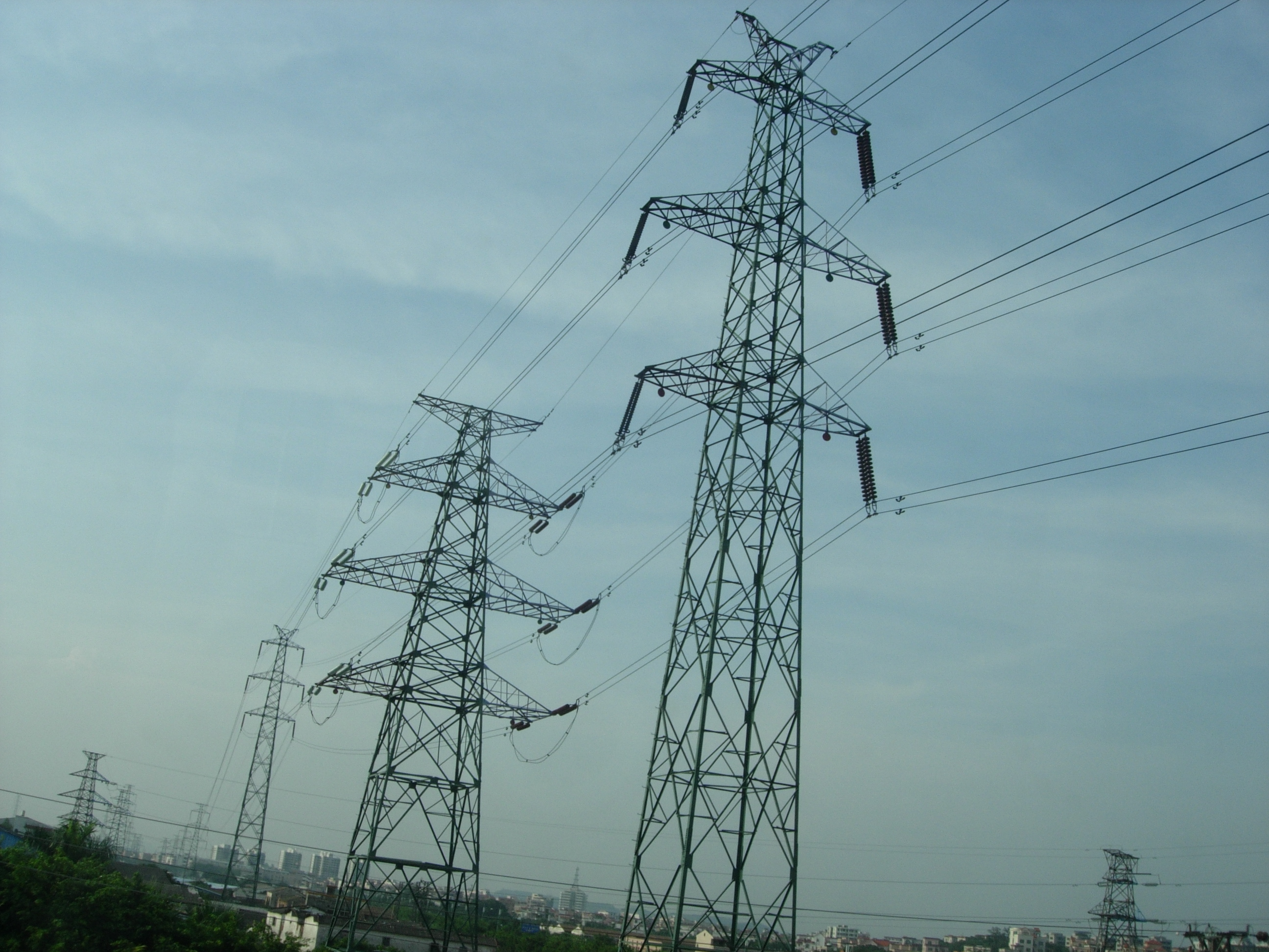 拍摄于中国广东.